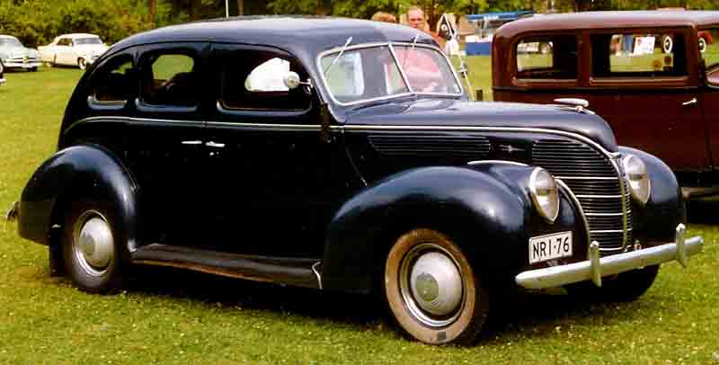 Ford Model 81A 730B De Luxe Fordor Sedan 1938